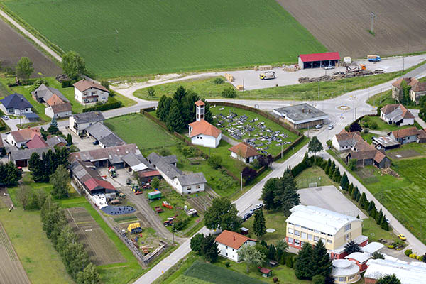 Göntérháza